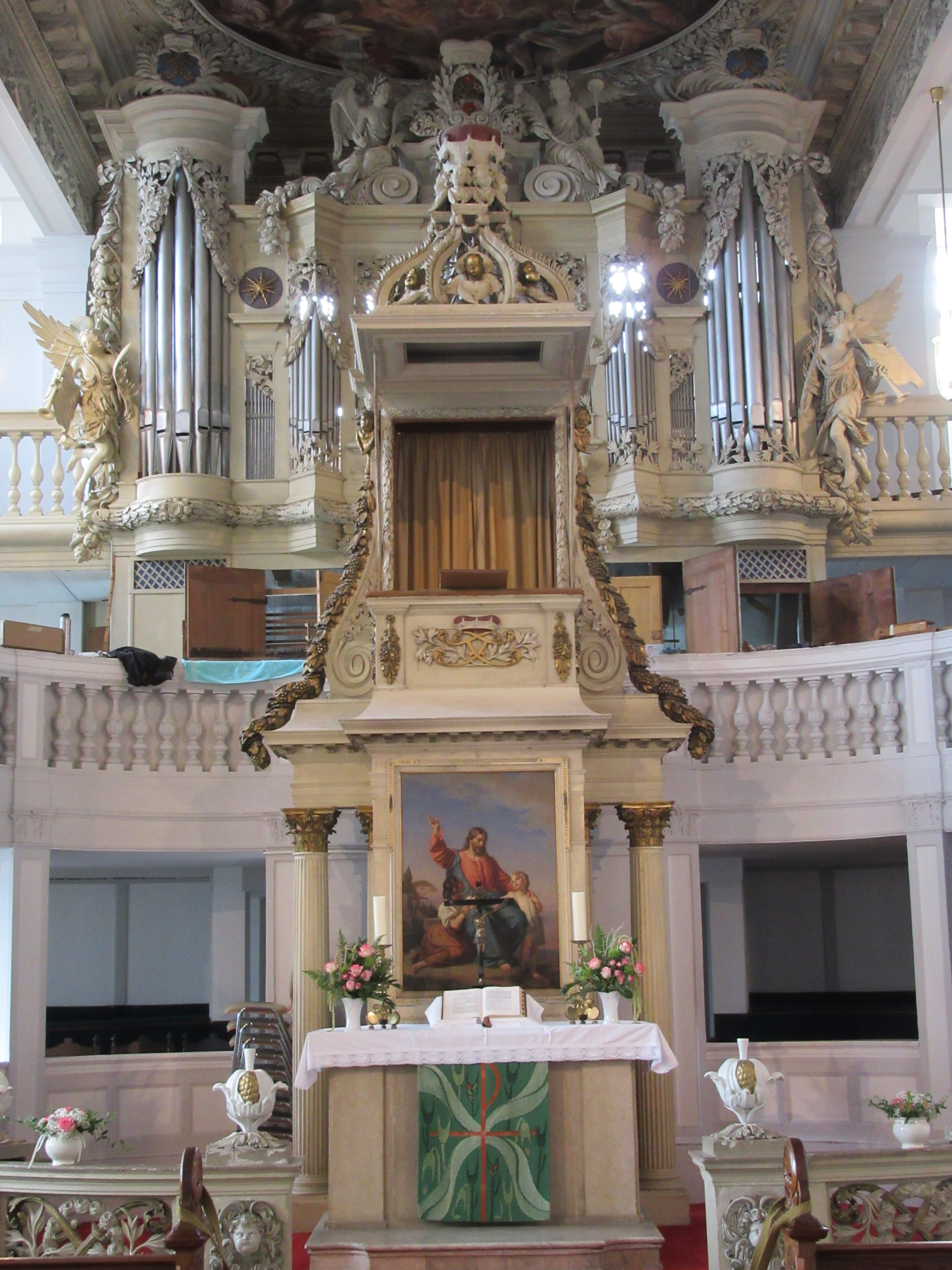 Schlosskirche, Schloss Friedenstein Gotha